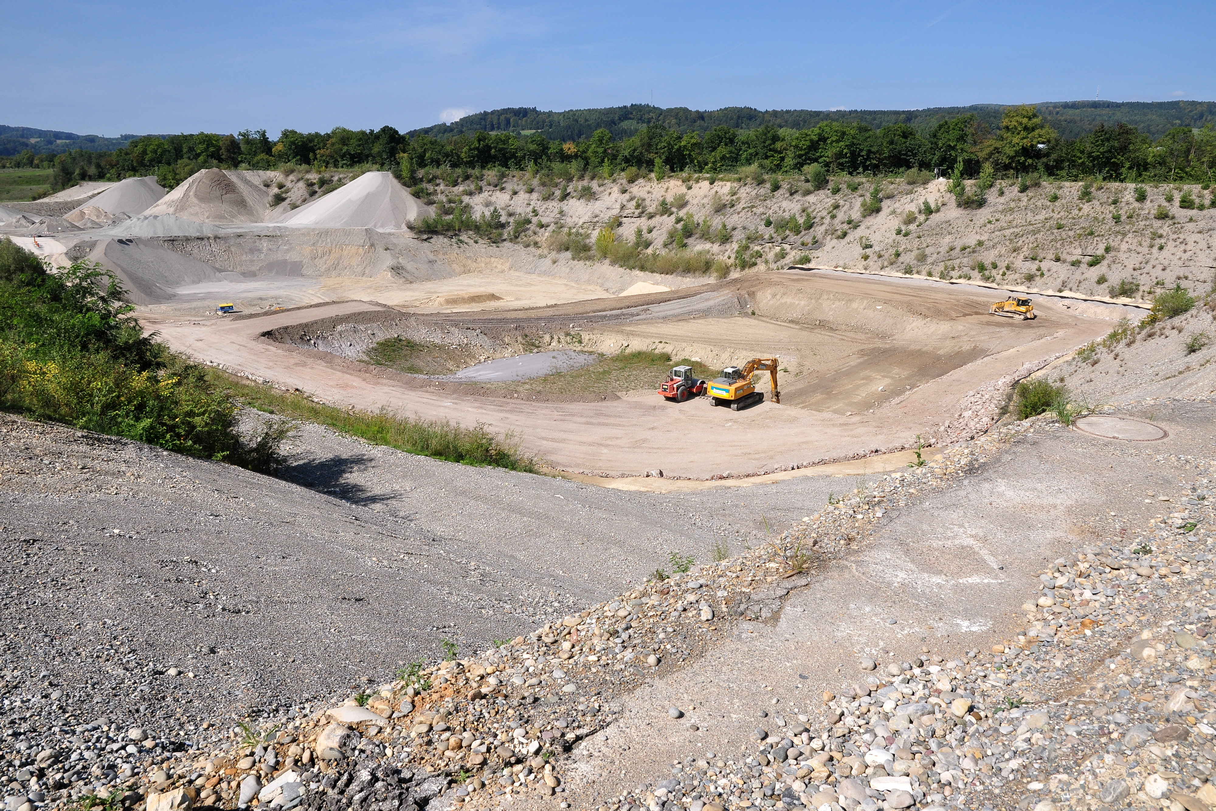 Weiacher Kies AG in Weiach (Switzerland)